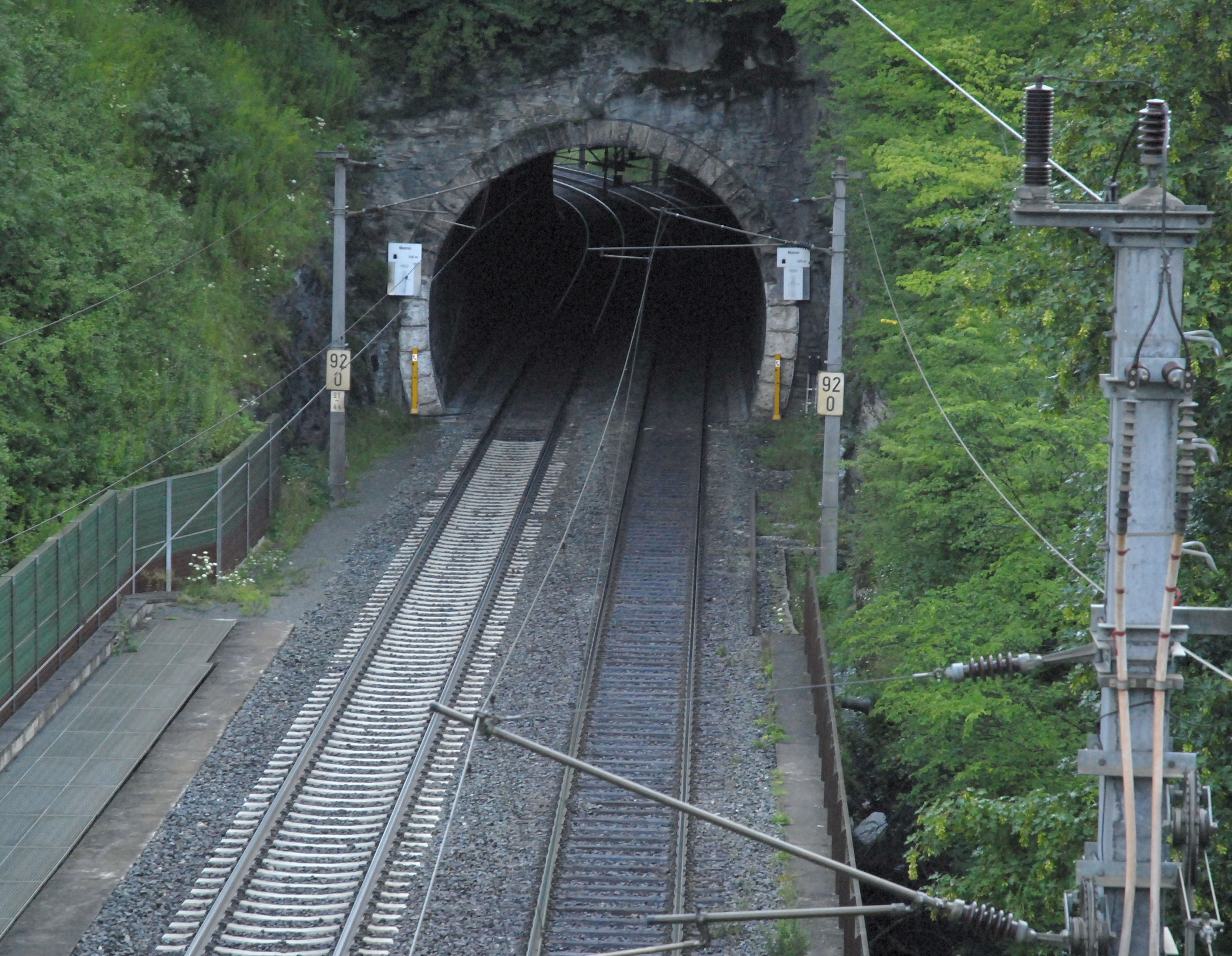 Tunnel Matrei der Brennerbahn unter dem Burgberg der Burg Trautson hindurch